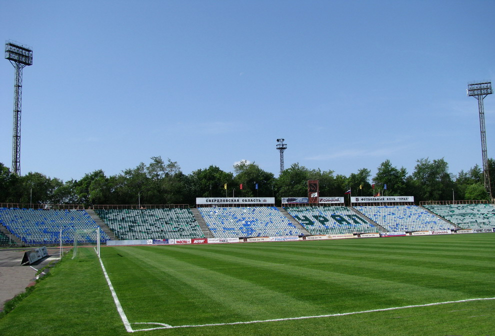 Стадион "Уралмаш" в одноимённом районе Екатеринбурга. Построен в 1930-х годах. Вмещает 13500 зрителей.